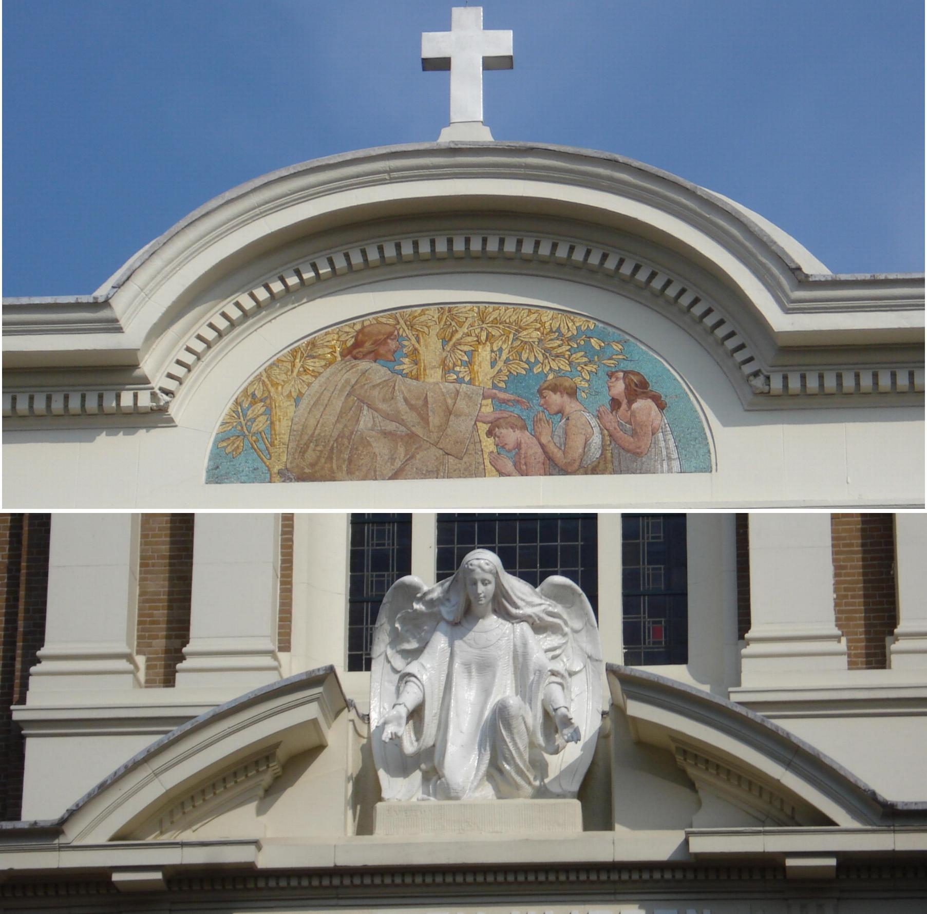 Rotterdam, Nieuwe Binnenweg 25, Paradijskerk. details. Rotterdam/The Netherlands.